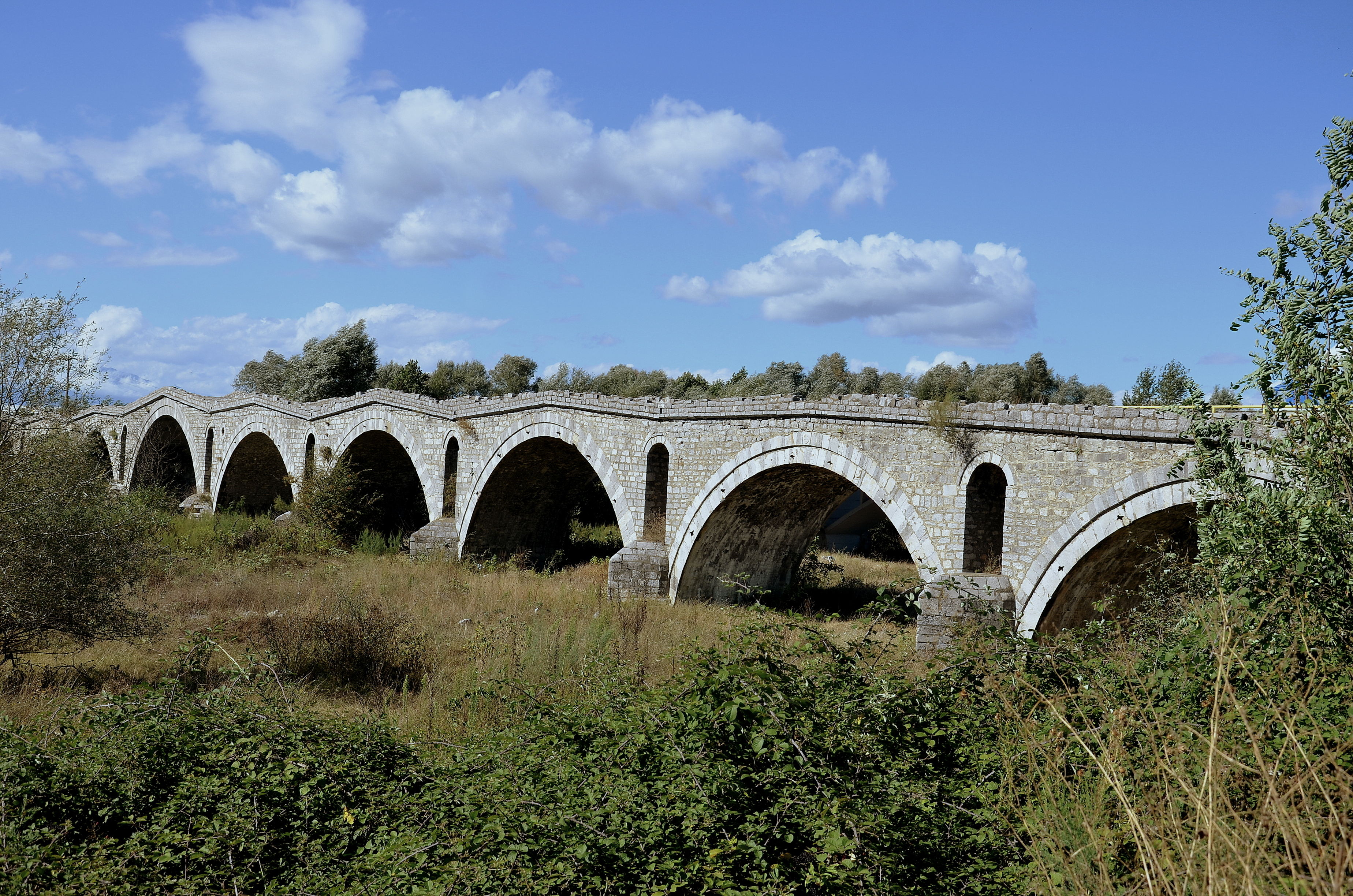 Ura e Terzive